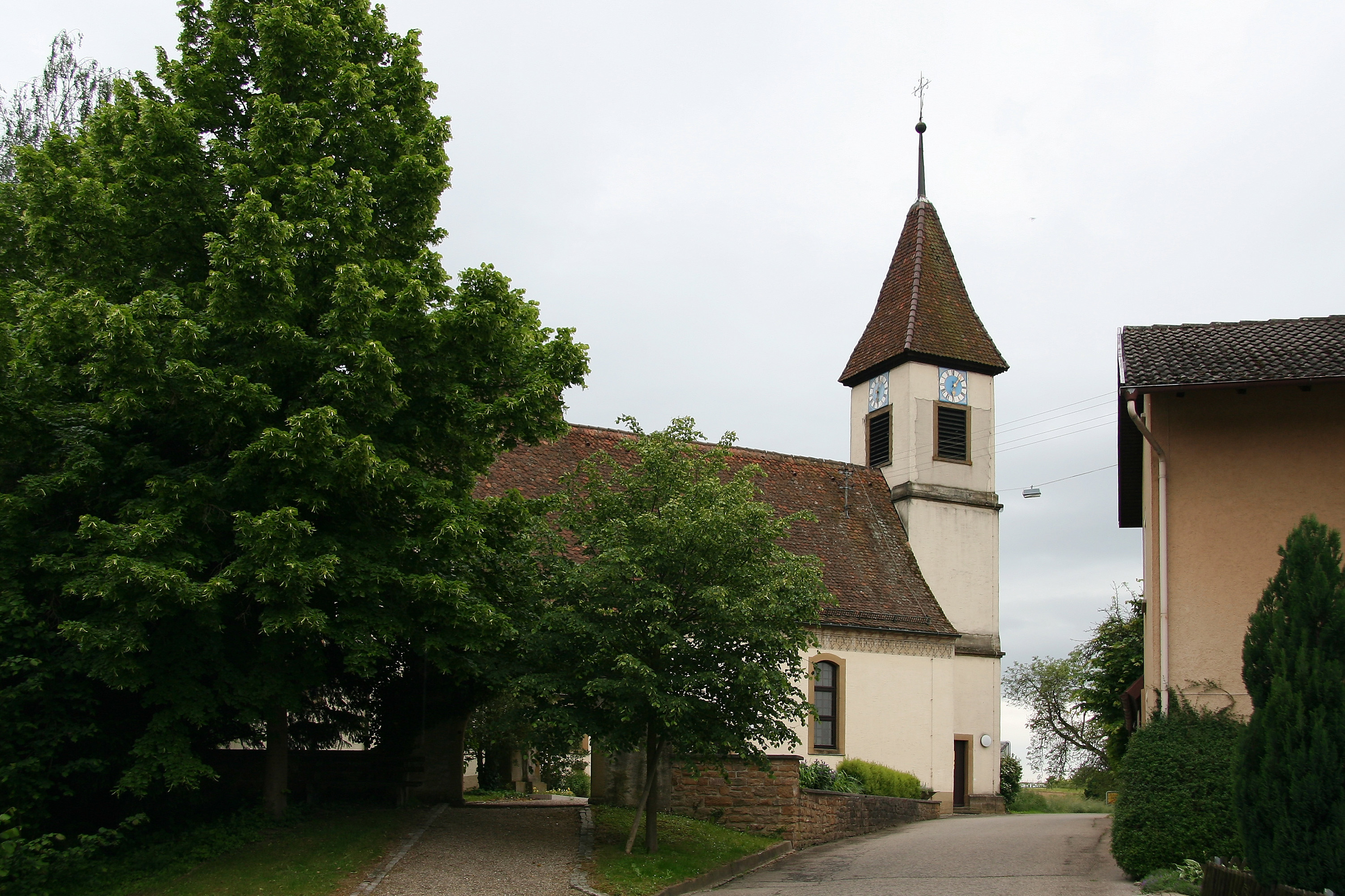 Kirche St. Jakobus in Dattingen (Müllheim), Außenansicht